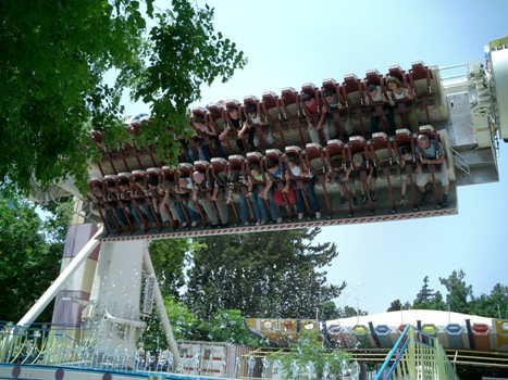 Top Spin (Lunapark Tel Aviv)